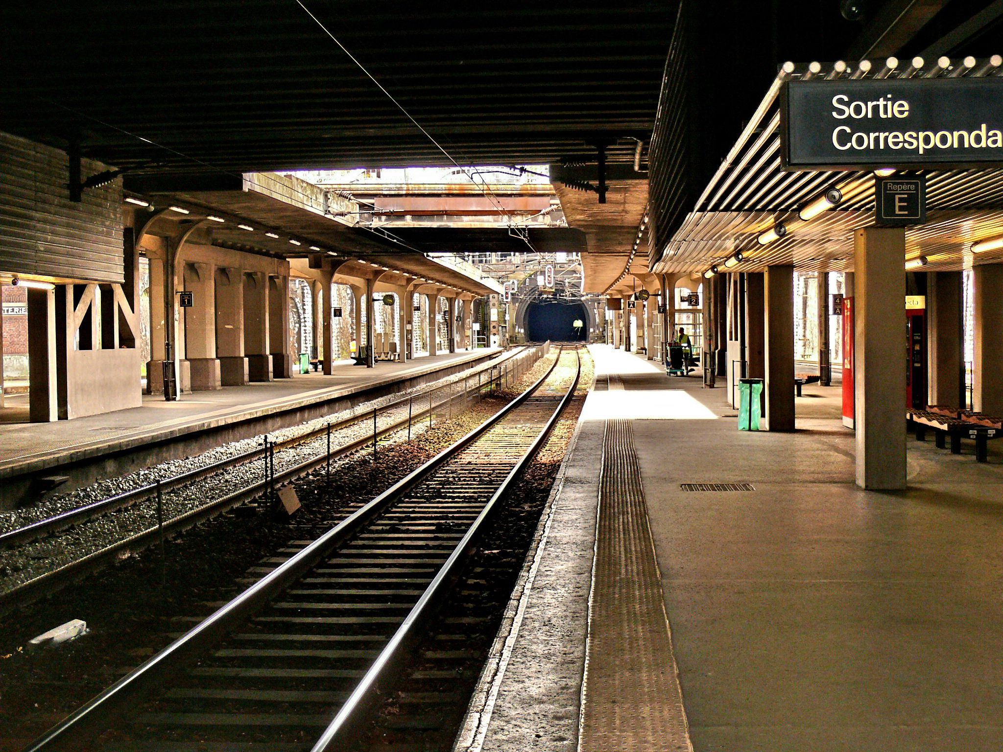 Gare de Rouen - Rive Droite : Les quais sont au niveau inférieur de la gare, coincés entre deux tunnels (on voit celui coté Le Havre)